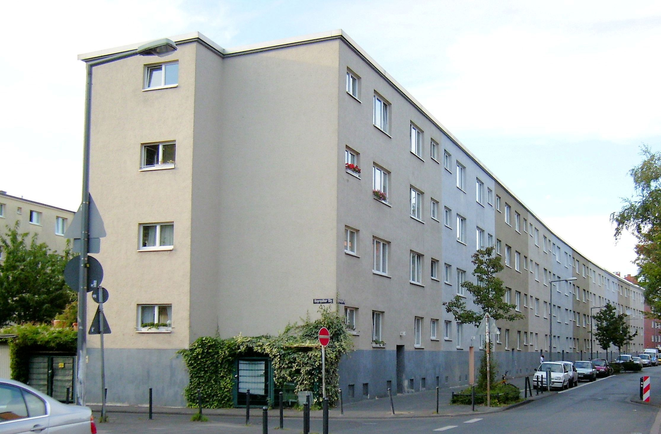 Ein Wohnblock der Schultheis-Siedlung an der Würzburger Straße 39 bis 57 in Köln-Höhenberg. Die im Vordergrund einmündende Bayreuther Straße stellt die Stadtteilgrenze zu Köln-Vingst dar.